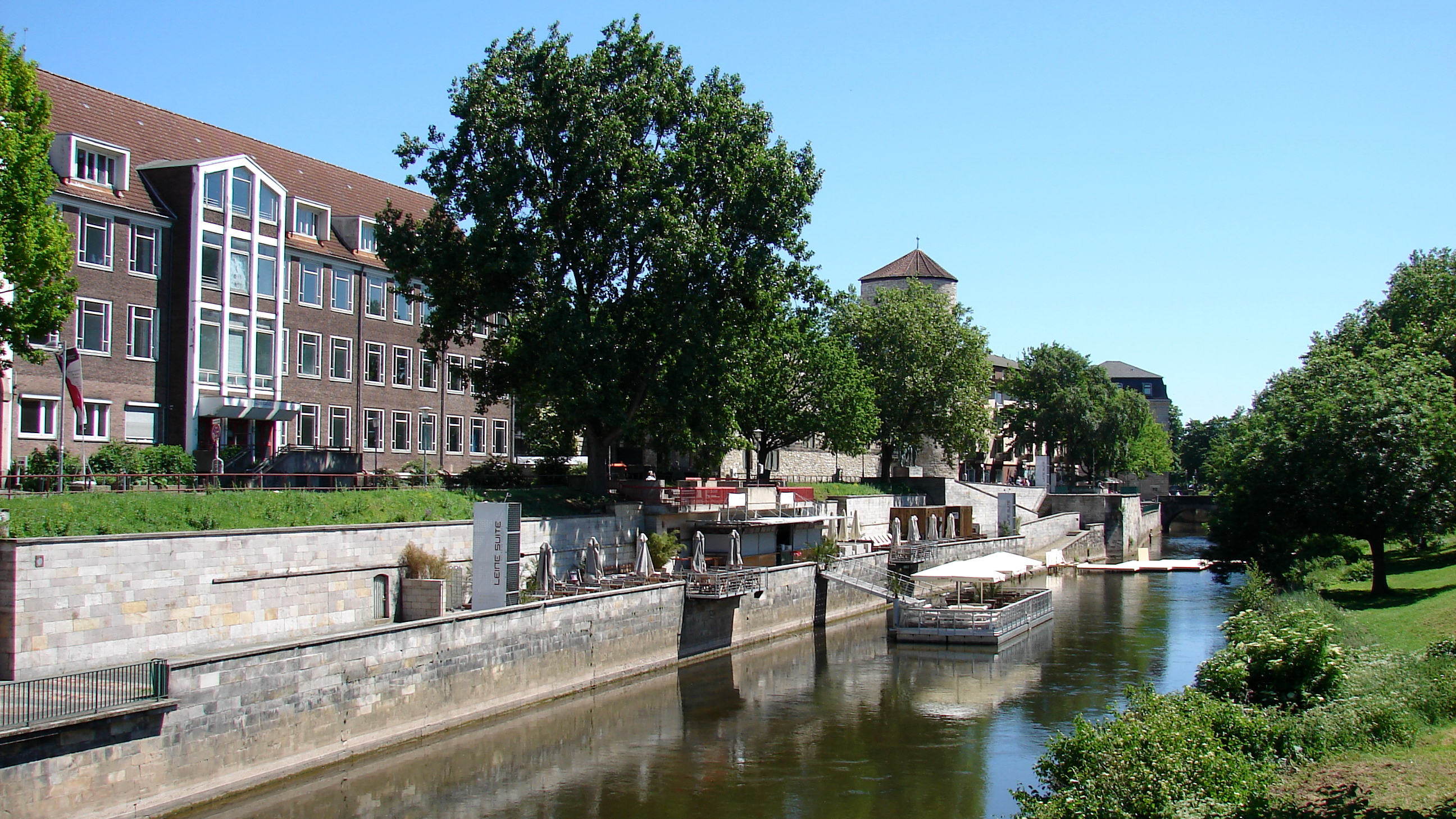 Leine am Hohen Ufer in Hannover